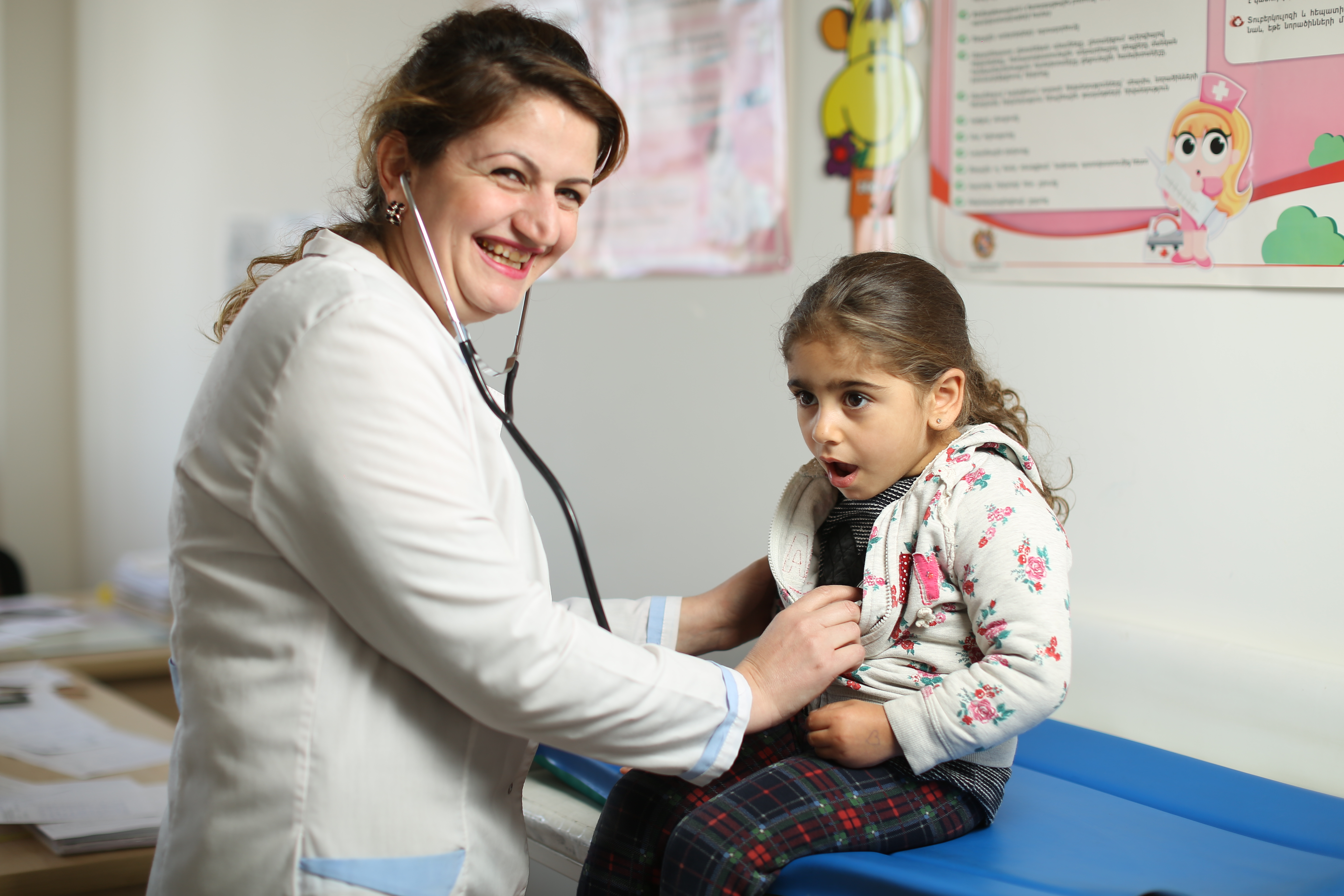 Հայ բժիշկներն անվճար զննում են երեխաներին